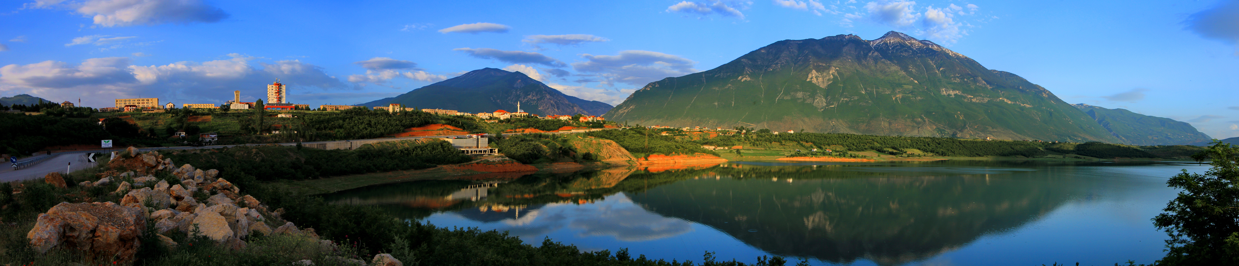 Liqeni Gjallica - Kukës 01